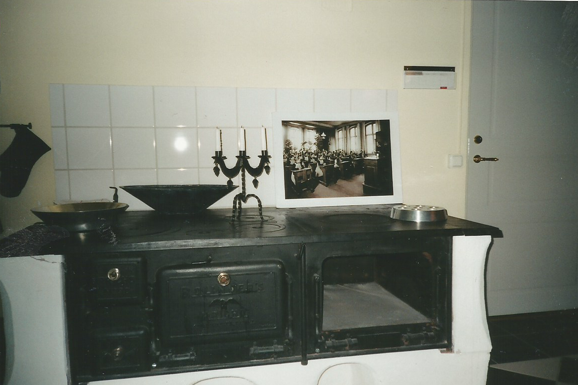 Ursprunglig spis finns kvar i skolbyggnaden.